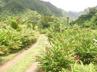 Plantation de Opuhi à Faaone